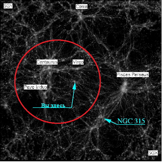 Indicazione del superammasso Lianeka